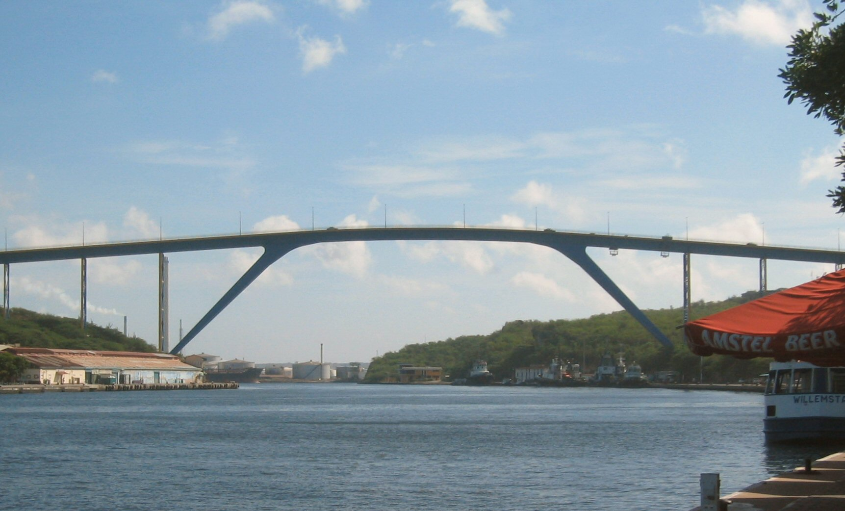 Koningin Julianabrug, Willemstad, Curaçao.